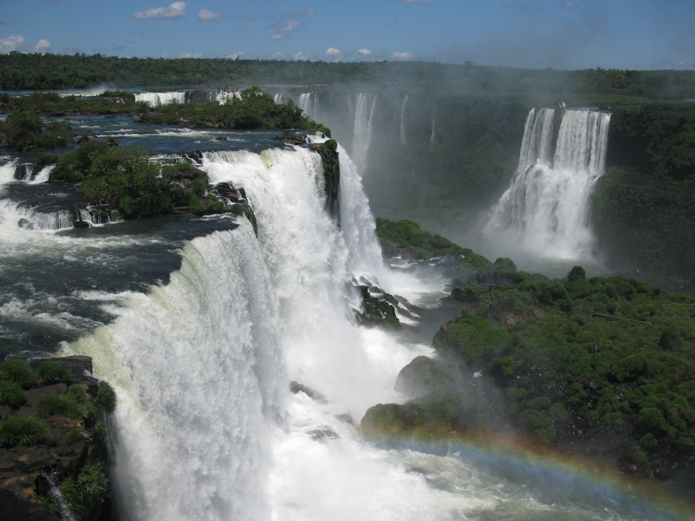 Cataratas do Iguaçu